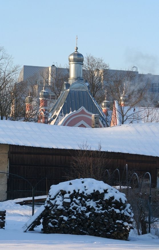 Mäe tänav.